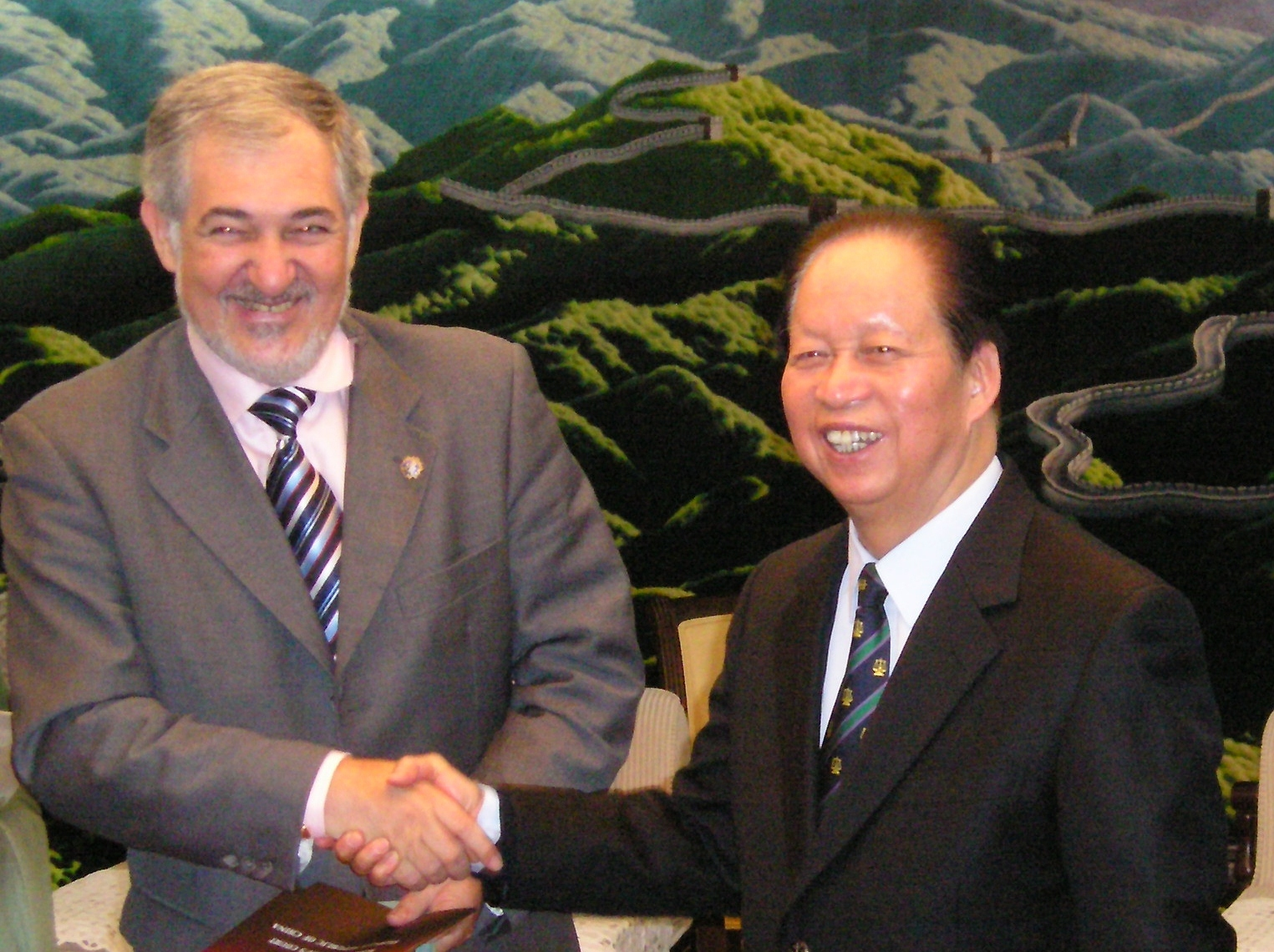 Spanish Attorney General with Chinese Suprem Cour President.